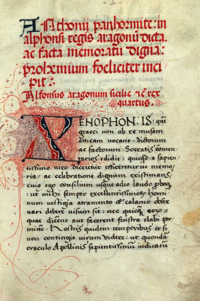 Antonio Beccadelli el Panormitano, Dichos y hechos de Alfonso, Rey de Aragón. Manuscrito, 1434-1450.